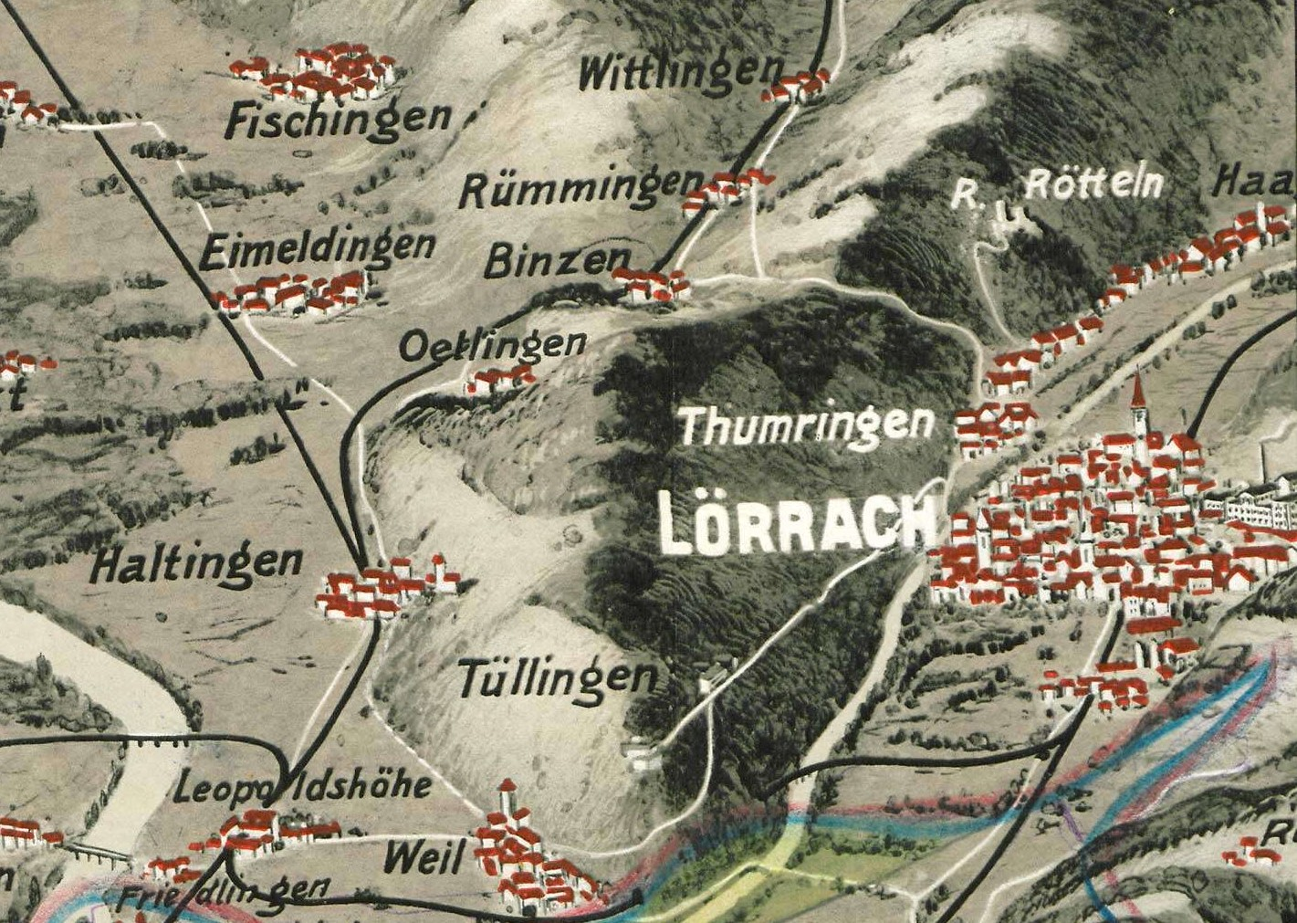 Lörrach und Tüllingen in einer katografischen Vogelperspektive